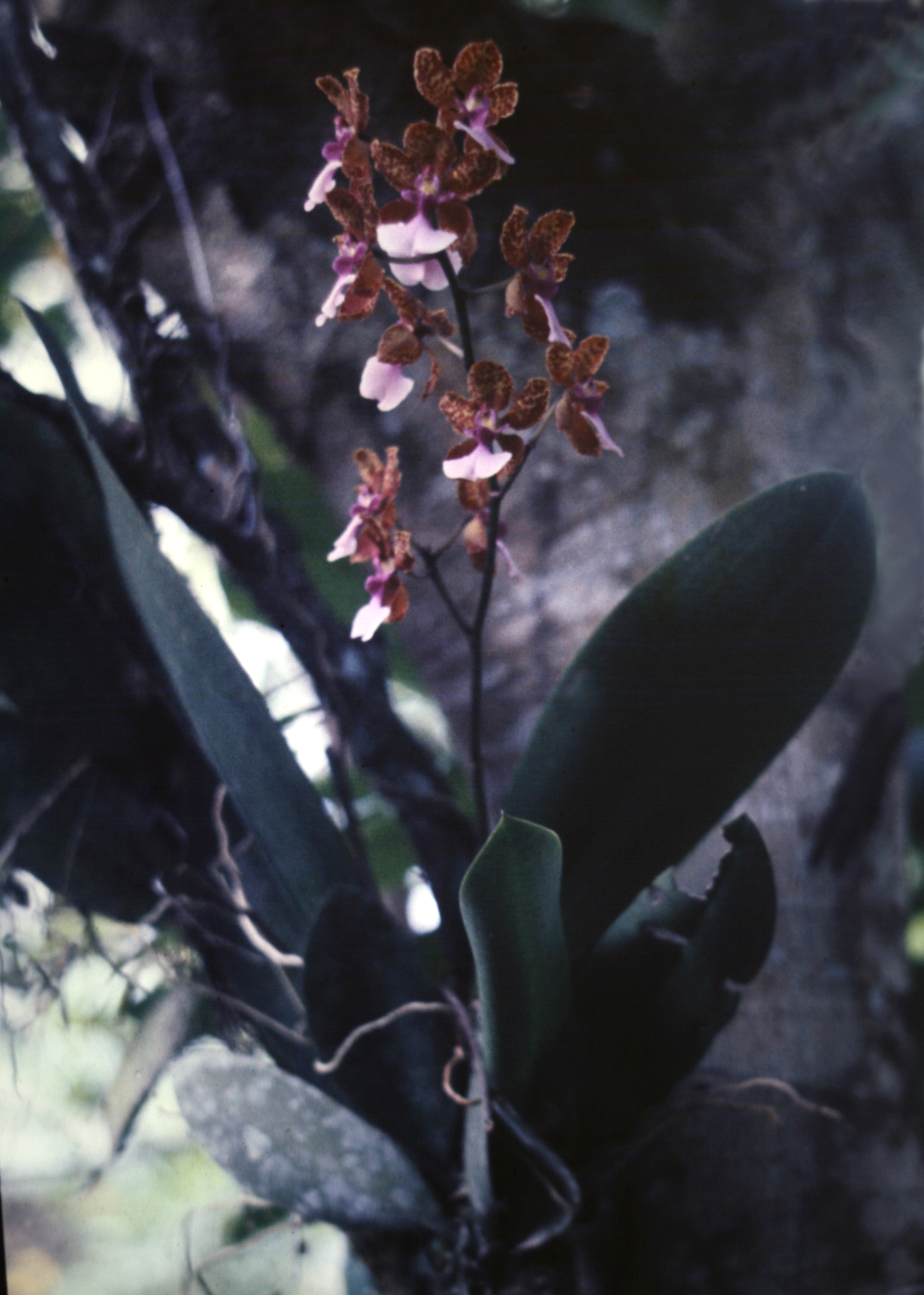 Oncidium lanceanum, Suriname.